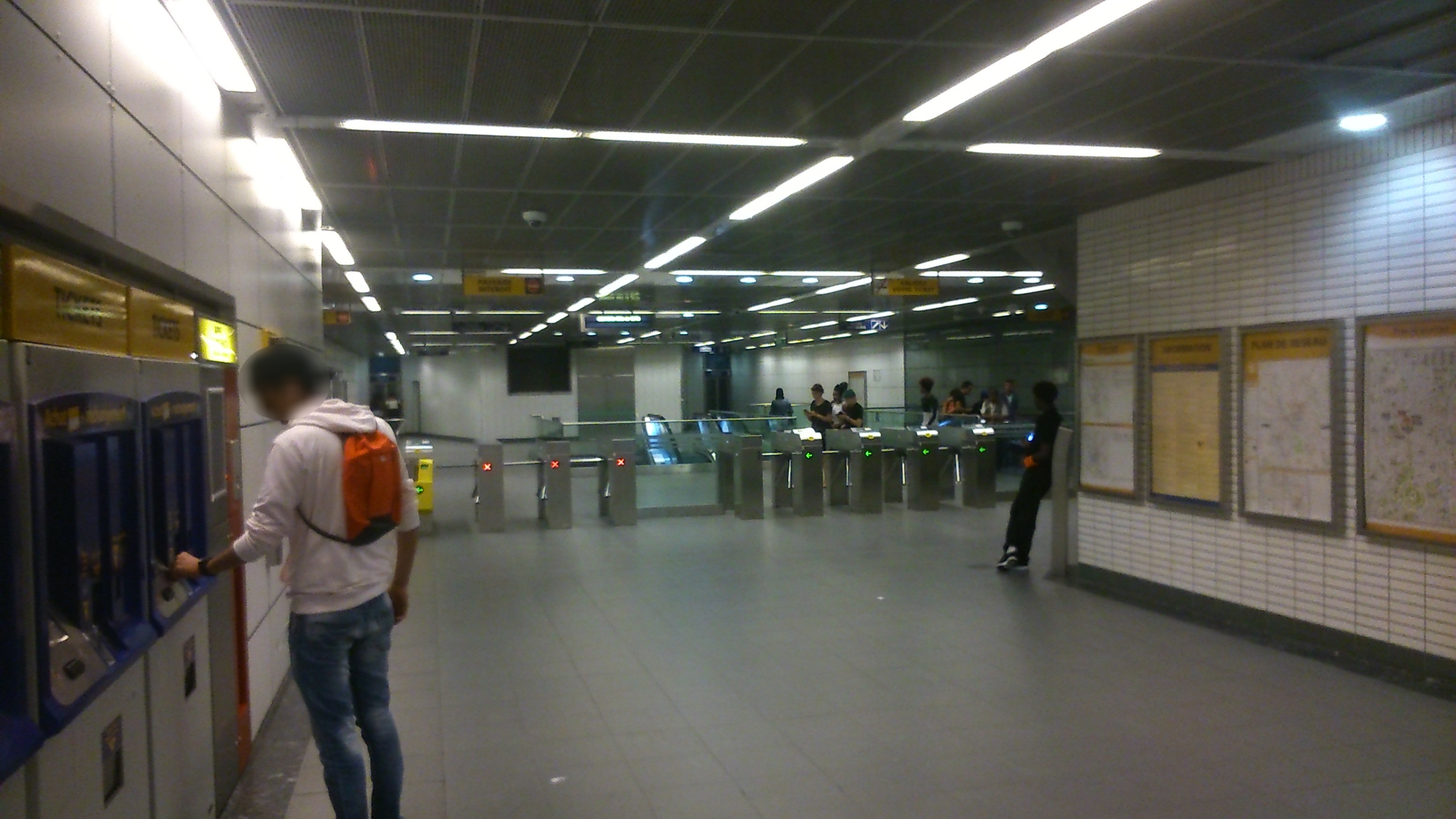 Salles des billets et tourniquets de la station François Verdier